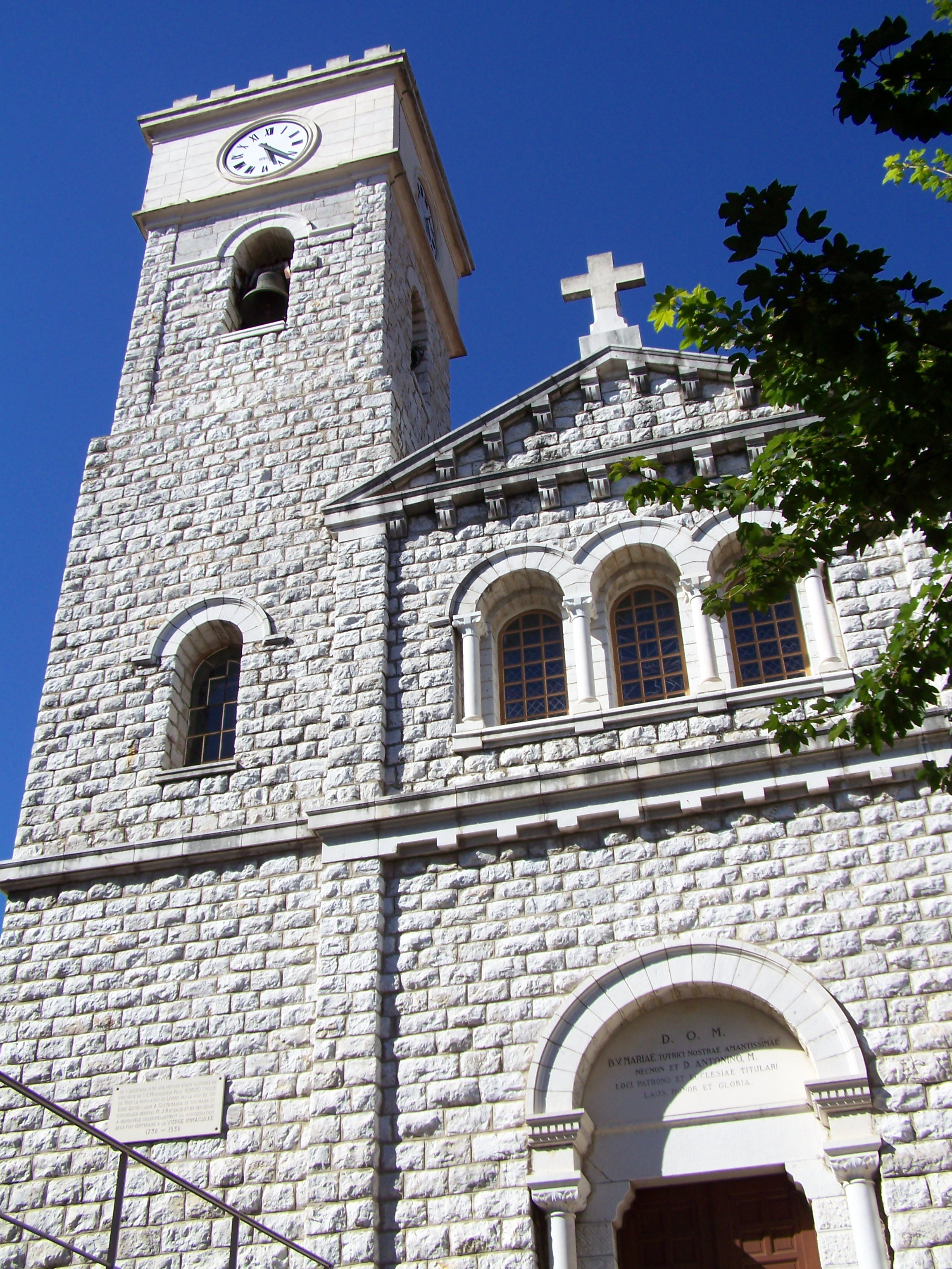 Façade de l'église paroissiale Saint Antonin de Levens (Alpes-Maritimes, France)